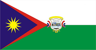 Bandera del Departamento de Cordillera Paraguaya